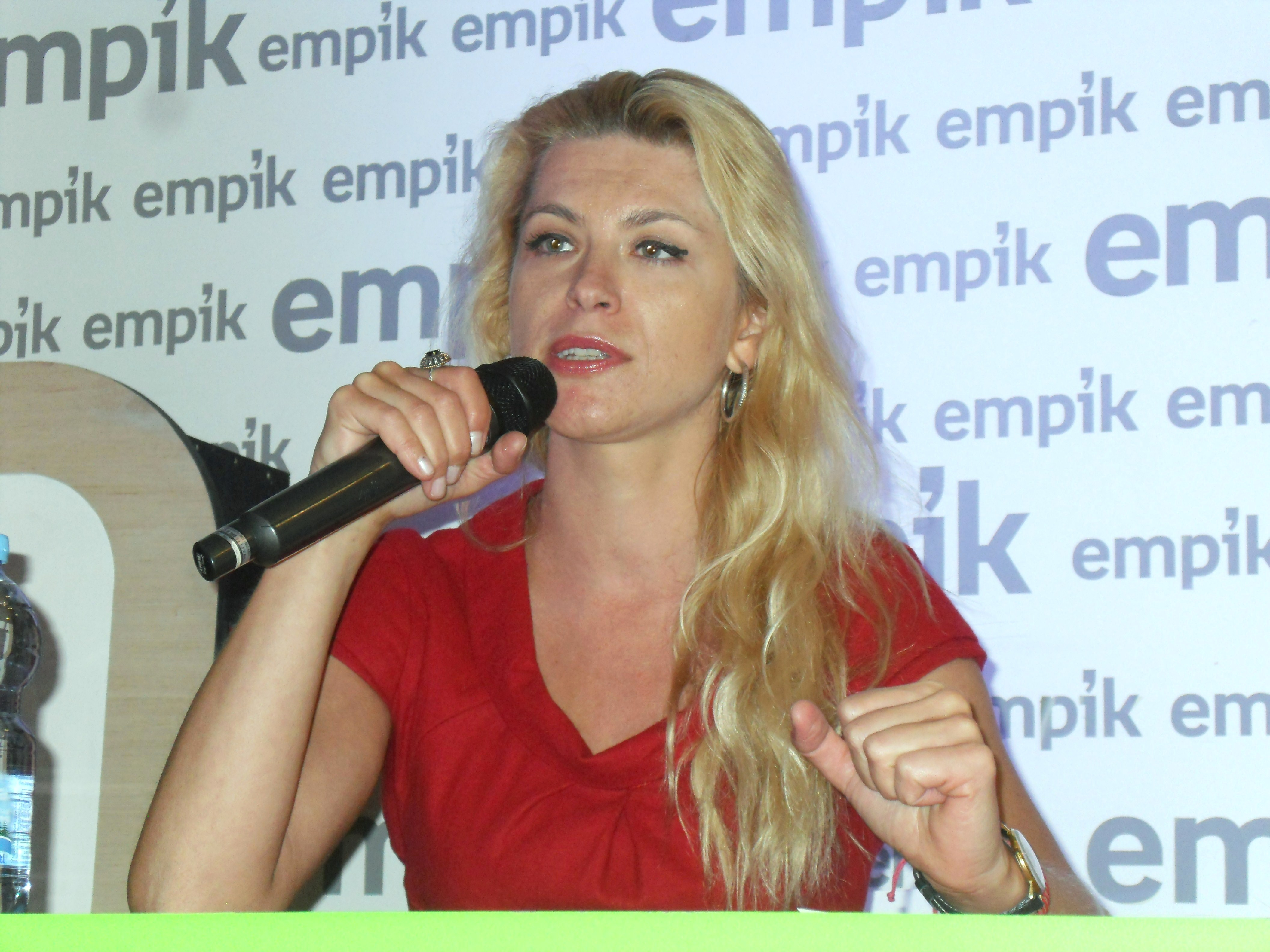 Katarzyna Bonda, dziennikarka i pisarka (Shakira polskiego kryminału).